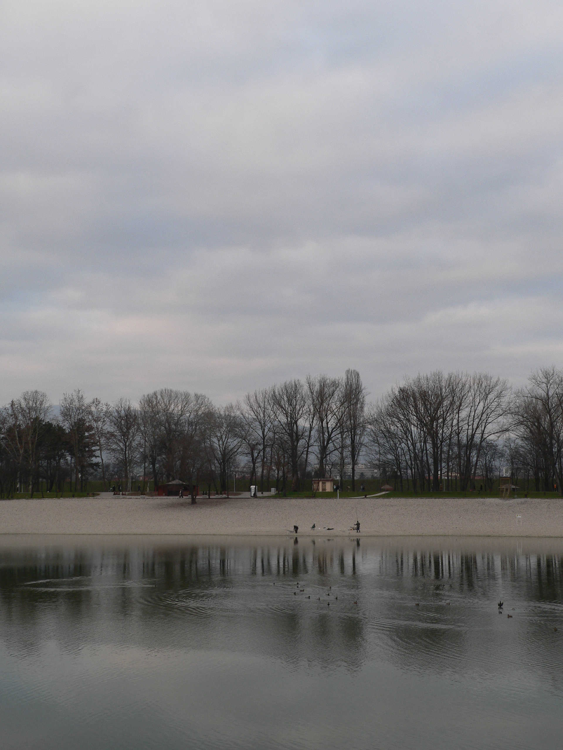 A View of Lake Bundek in Zagreb